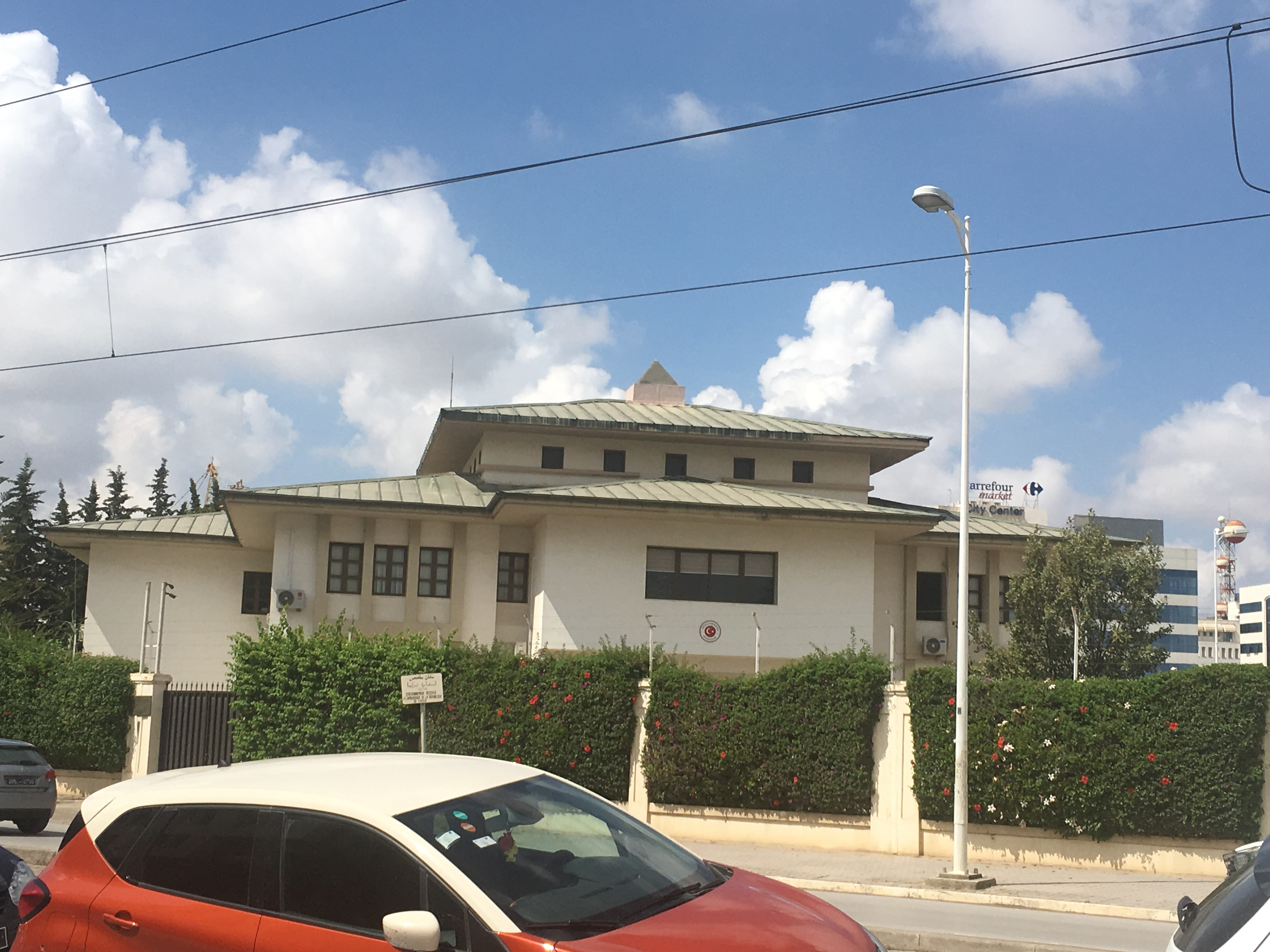 Ambassade de Turquie en Tunisie, 2019.